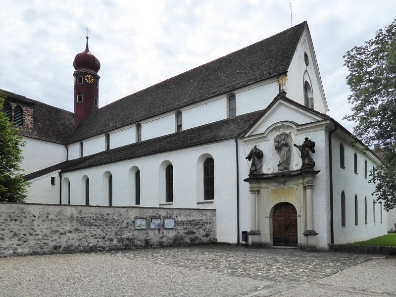 Kloster Wettingen